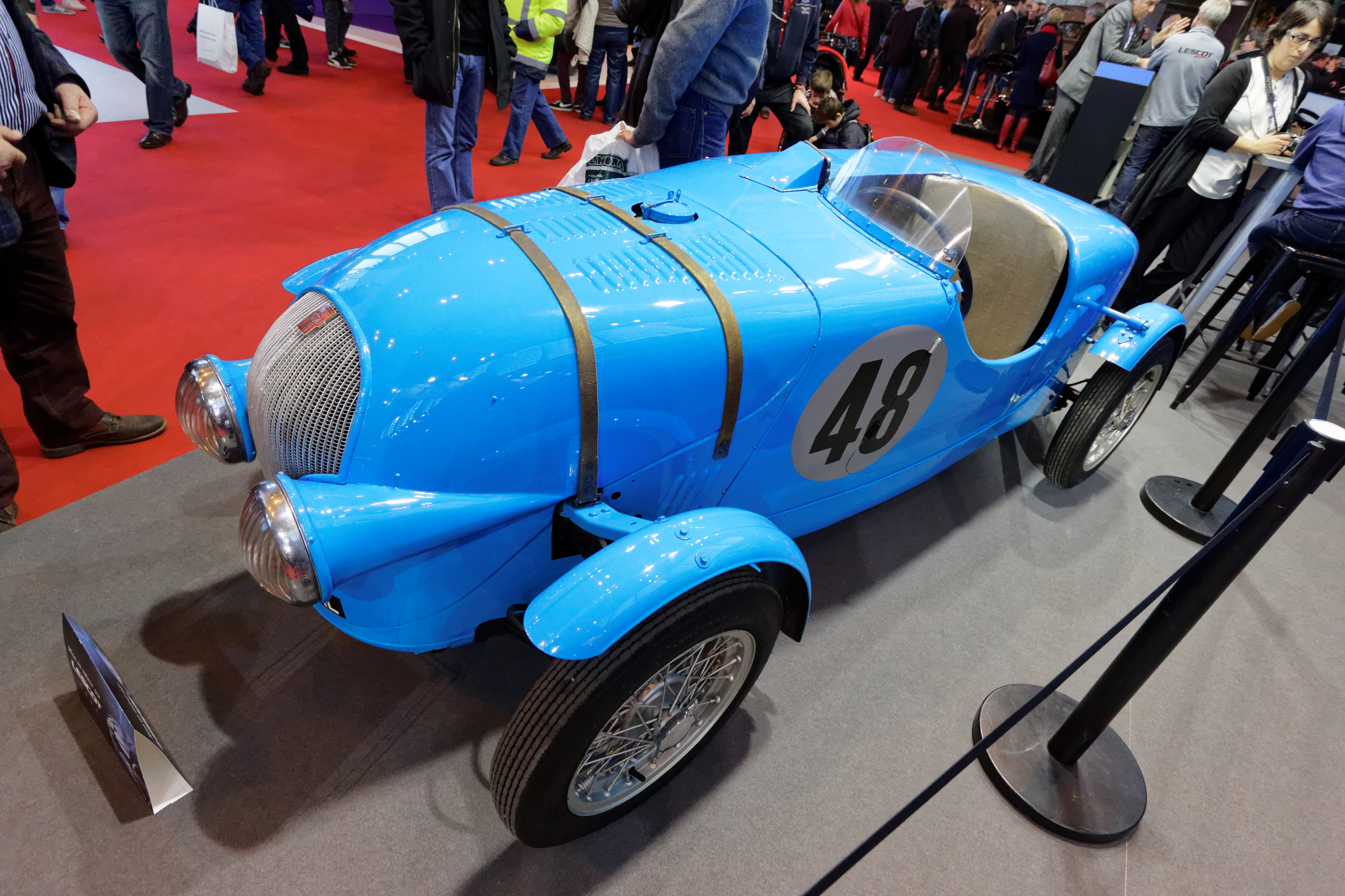 Une des voiture présentée lors du salon Rétromobile de Paris 2015